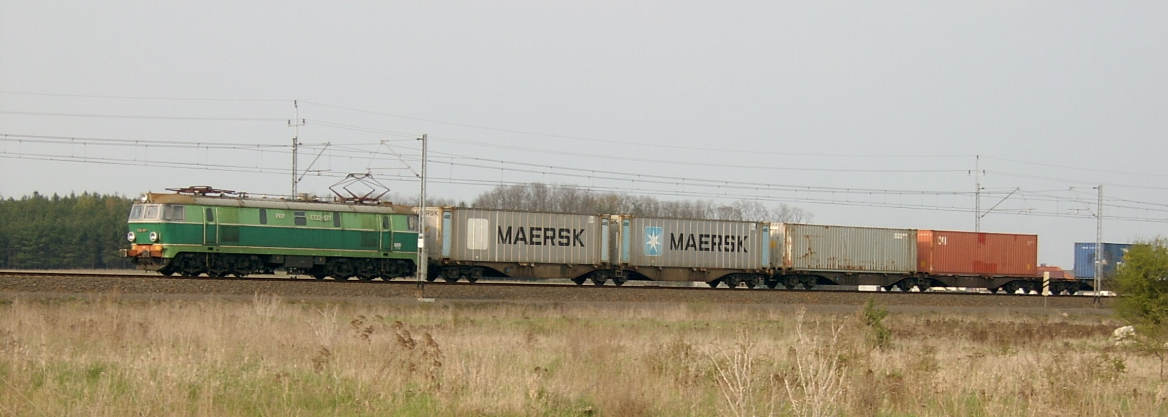 Słubice, pociąg towarowy